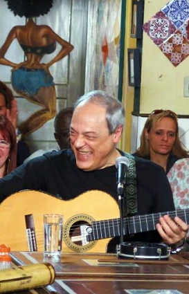 Toquinho, cantor e compositor brasileiro.